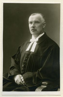 Gustav Rutopõld